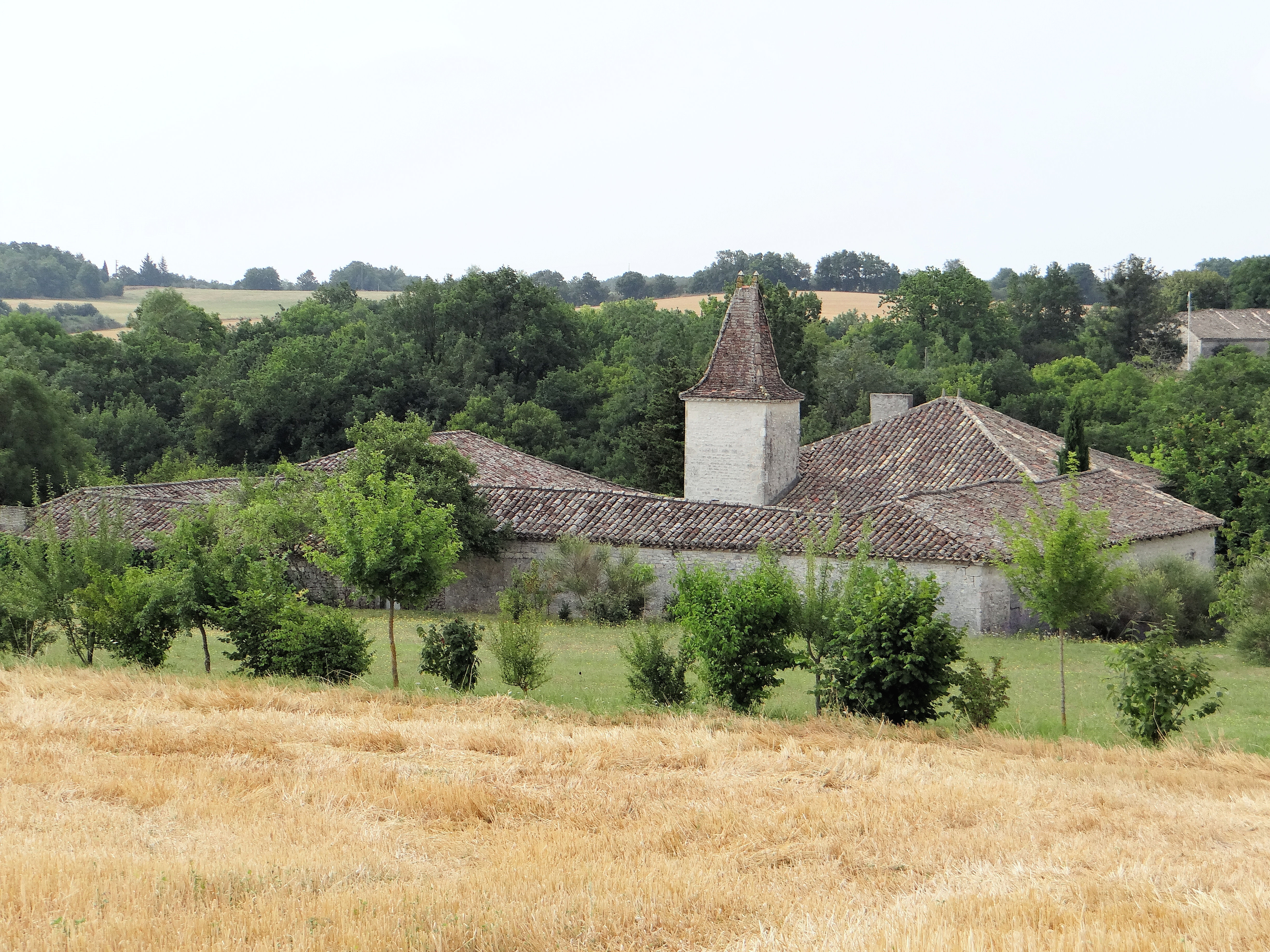 Belvèze - Ferme de Ratelle - Vue générale